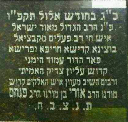 ציון קבר ר' אורי מסטרליסק "השרף הקדוש"